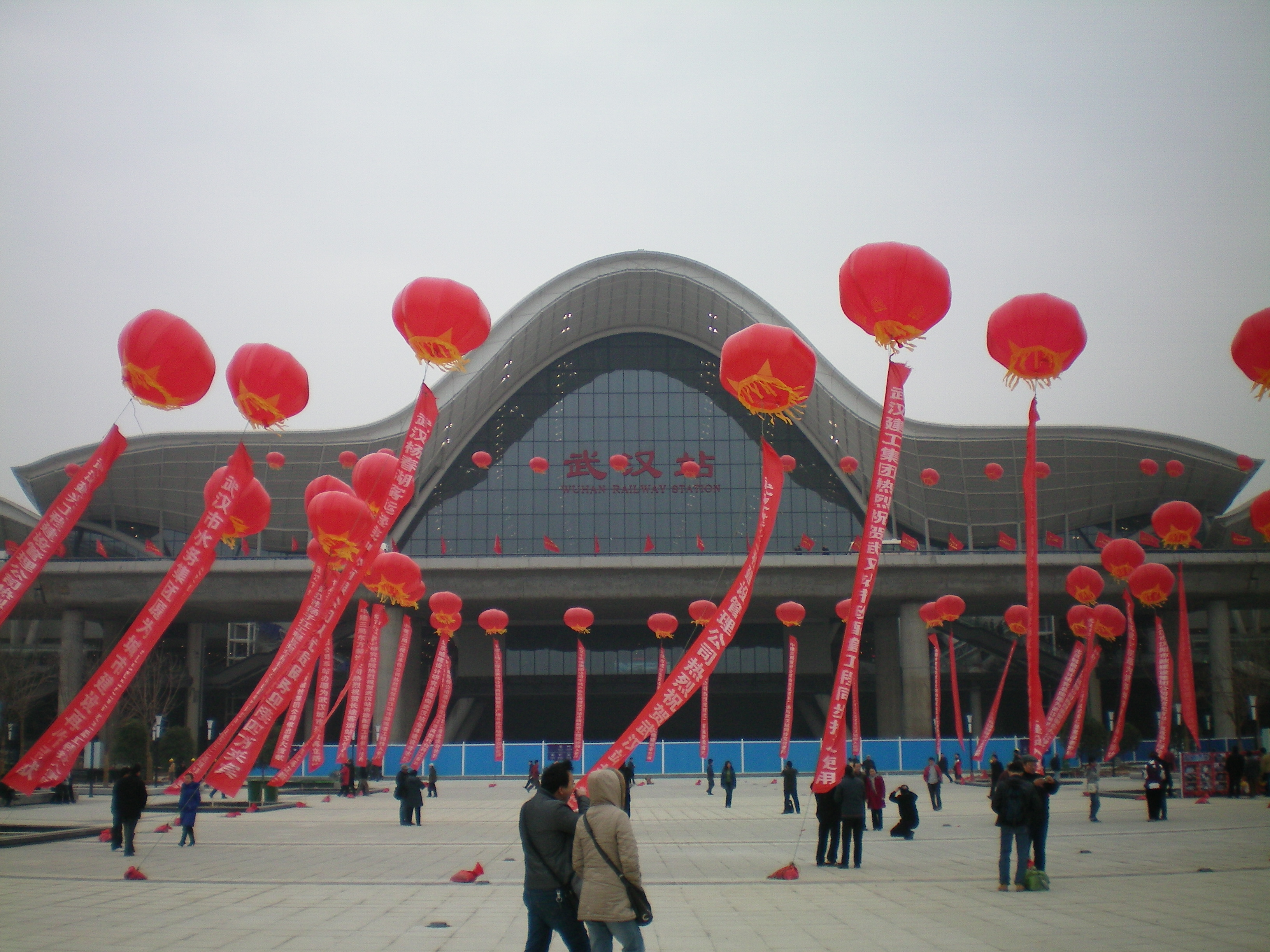 武汉火车站东进站厅